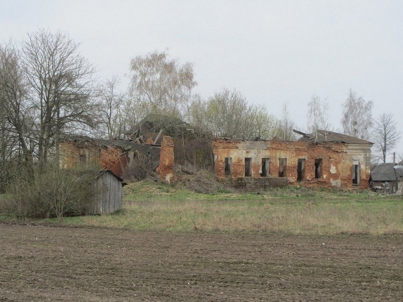 Цясноўка. Алея каля Нагорнаўскай школы